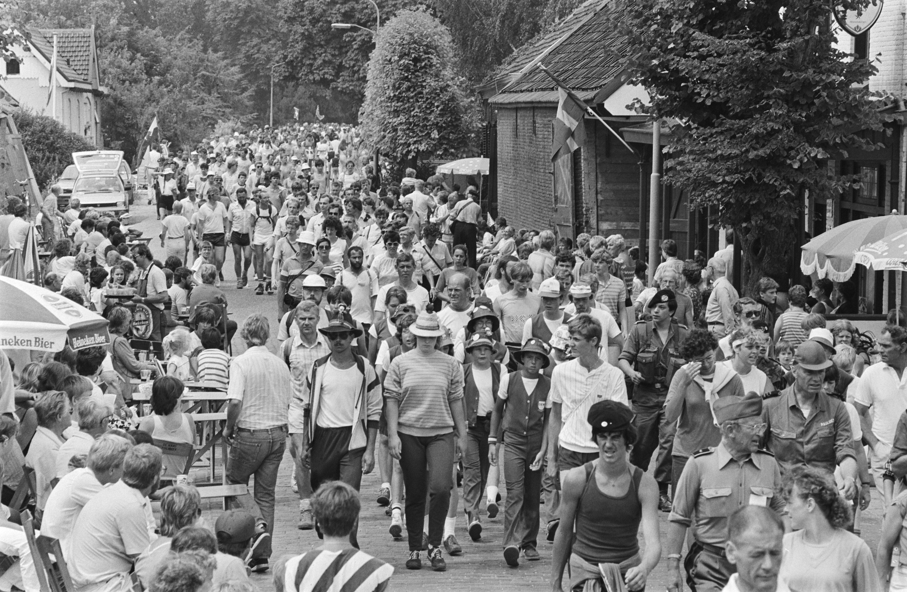 Collectie / Archief : Fotocollectie Anefo Reportage / Serie : Eerste dag van de Vierdaagse in Nijmegen Beschrijving : Wandelaars in Elst Datum : 19 juli 1983 Locatie : Elst, Gelderland Trefwoorden : voettochten, wandelen Fotograaf : Antonisse, Marcel / Anefo Auteursrechthebbende : Nationaal Archief Materiaalsoort : Negatief (zwart/wit) Nummer archiefinventaris : bekijk toegang 2.24.01.05 Bestanddeelnummer : 932-6535